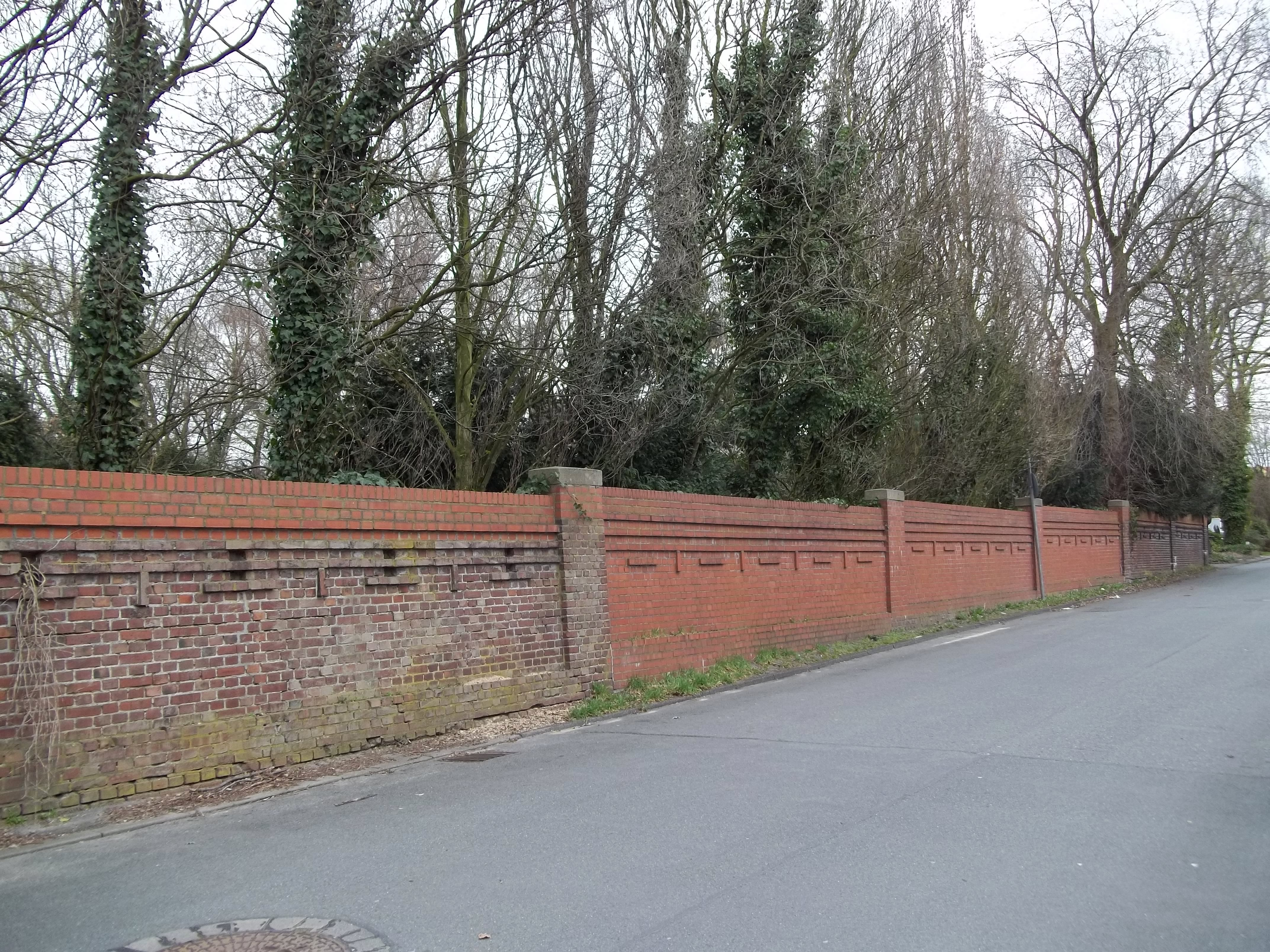 Mauer vor der ehemaligen Synagoge Wanne-Eickel an der Langekampstraße, Wanne-Süd